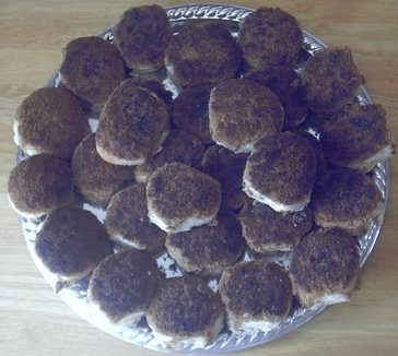 Foto de unas facturas, llamadas Tortitas Negras